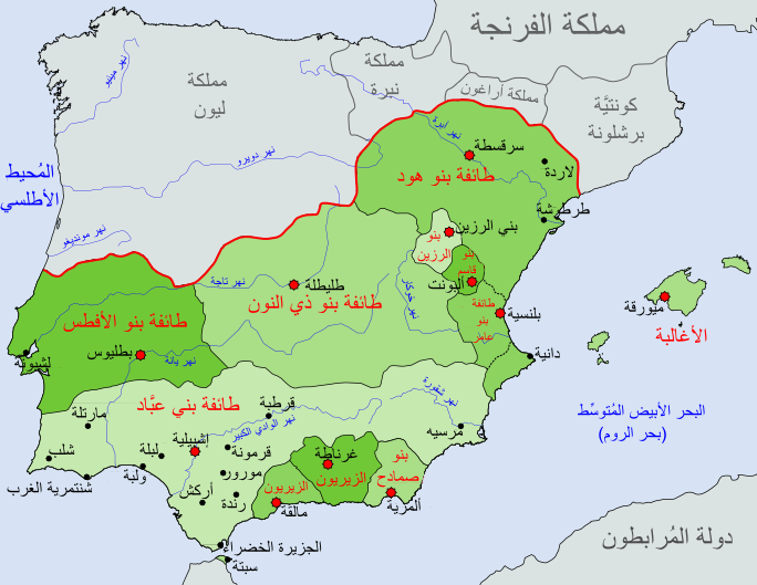 ملوك الطوائف بالأندلس حوالي سنة 1080م